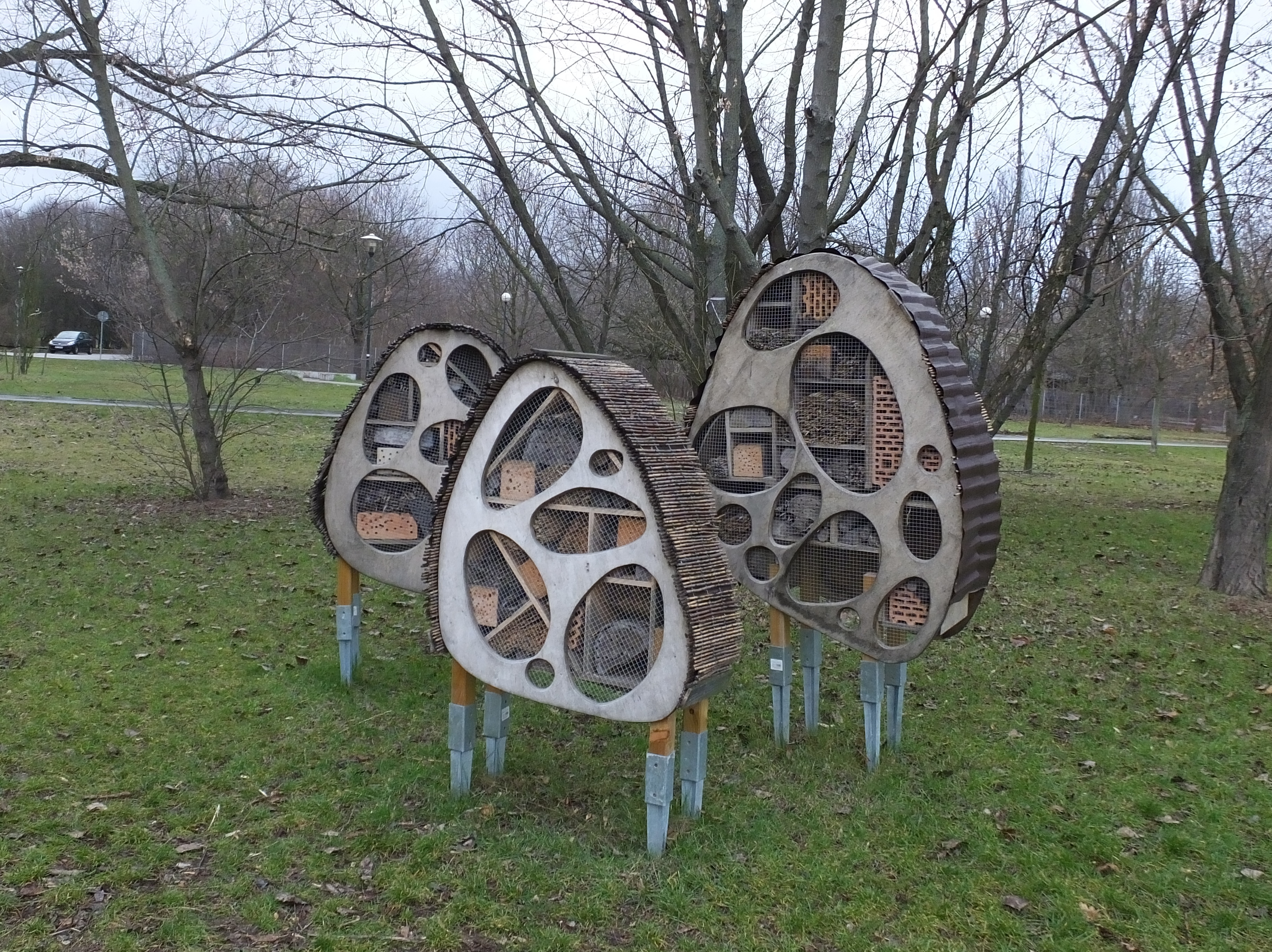 Hotele dla owadów stojące w ochockiej części Pola Mokotowskiego zimą 2019/2020